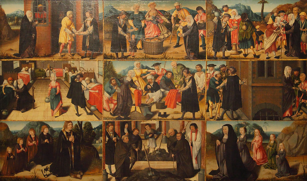 Meester van de Levensbron, De Zeven Werken van Barmhartigheid, 0039 Meester van de Levensbron, de Zeven Werken van Barmhartigheid